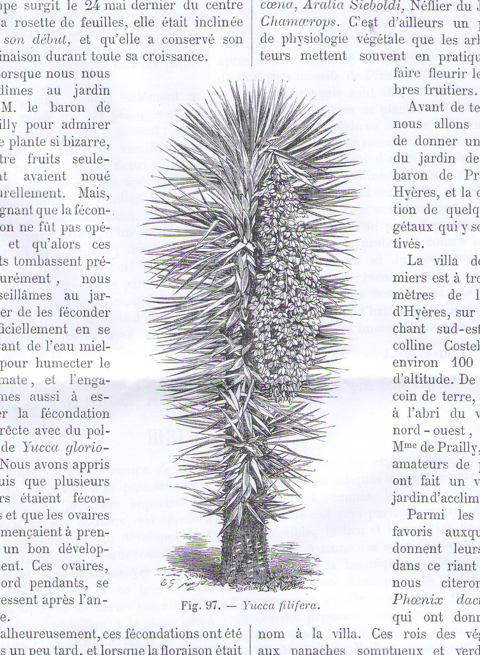 Floraison du Yucca des Prailly